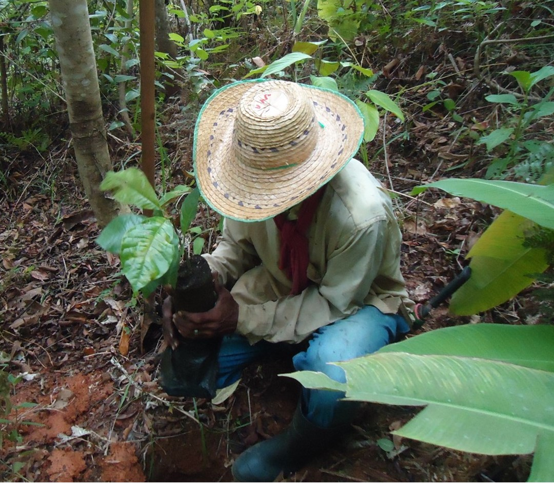 plantaçao de uma muda de magnolia silvioi